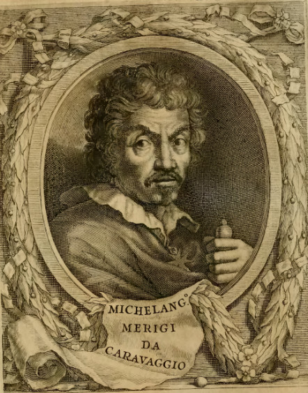 Immagine di Caravaggio tratta dal libro Giovan Pietro Bellori, Le vite de' pittori, scultori et architetti moderni, Roma, 1672, p. 199.